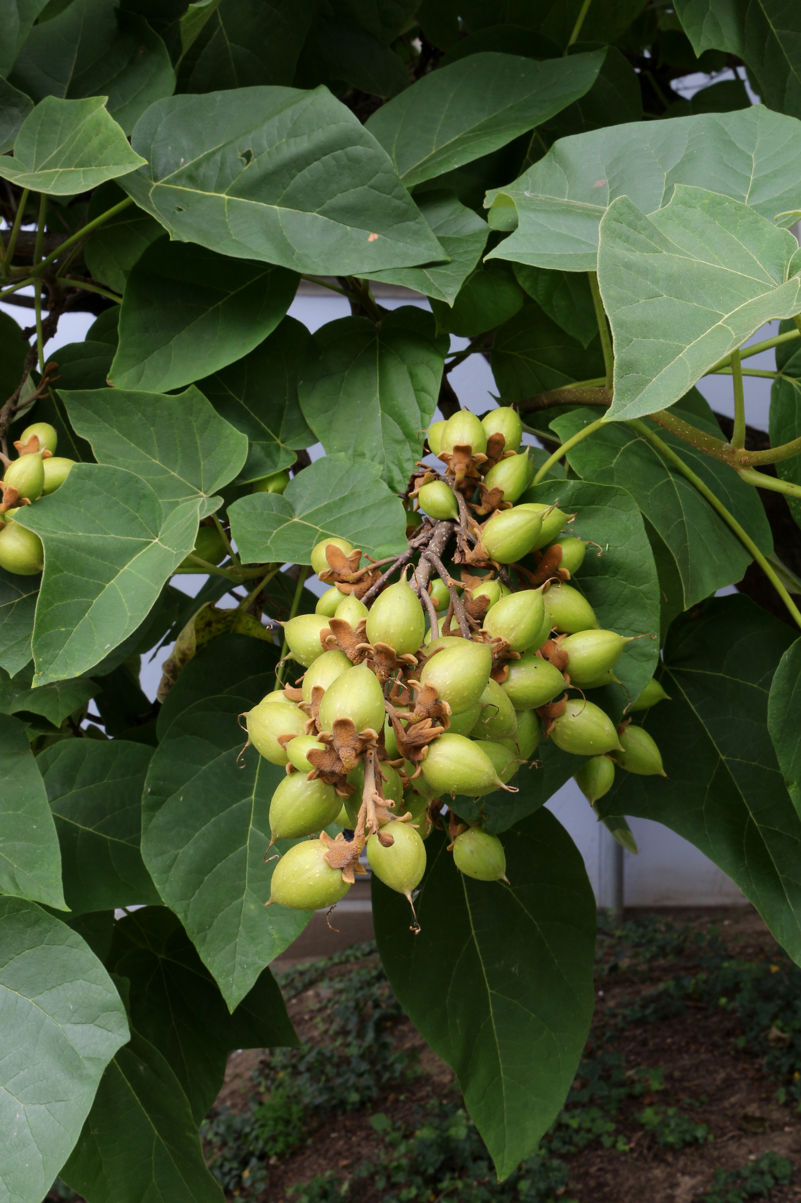 Blätter und Früchte eines Blauglockenbaums (Paulownia tomentosa)